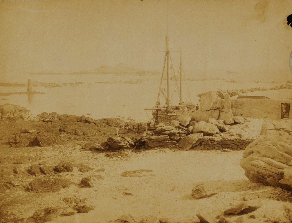 Jules Girard : Entrée de la rivière de la Penzé (photographie de 1888)